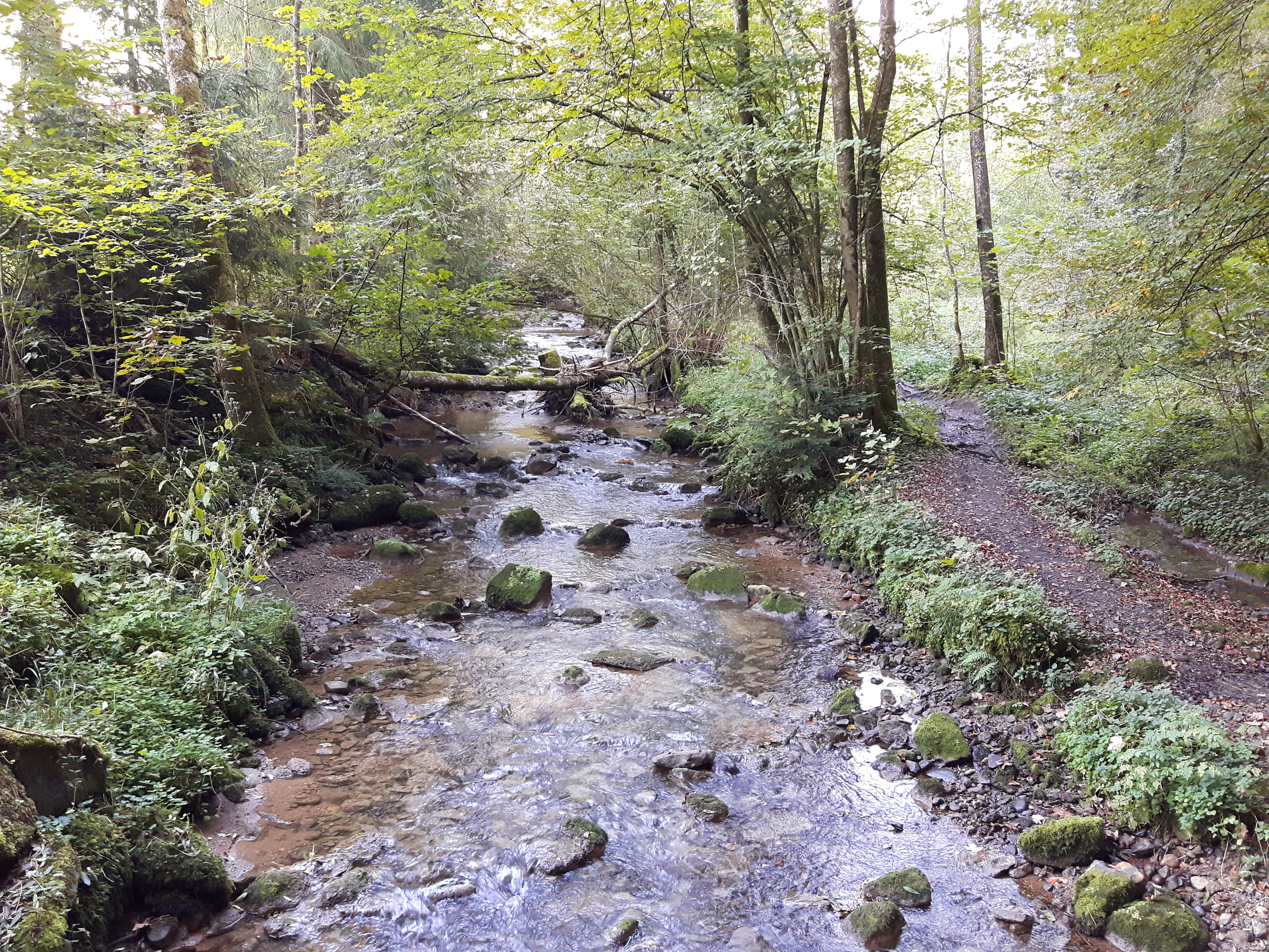 Der Jonenbach bei Hodel, Aeugst am Albis, Kanton Zürich